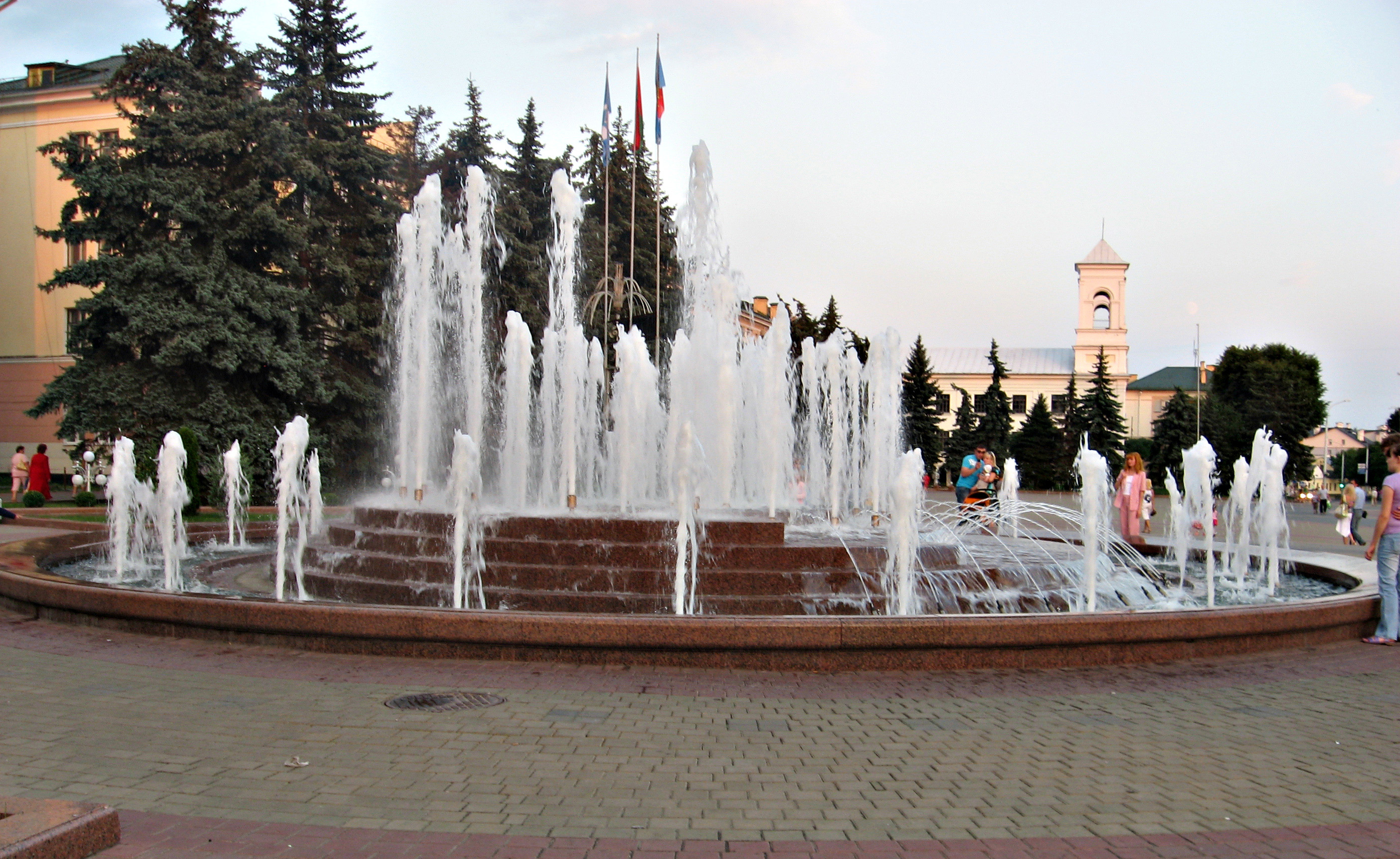 Lieninski rajon, Brest, Belarus